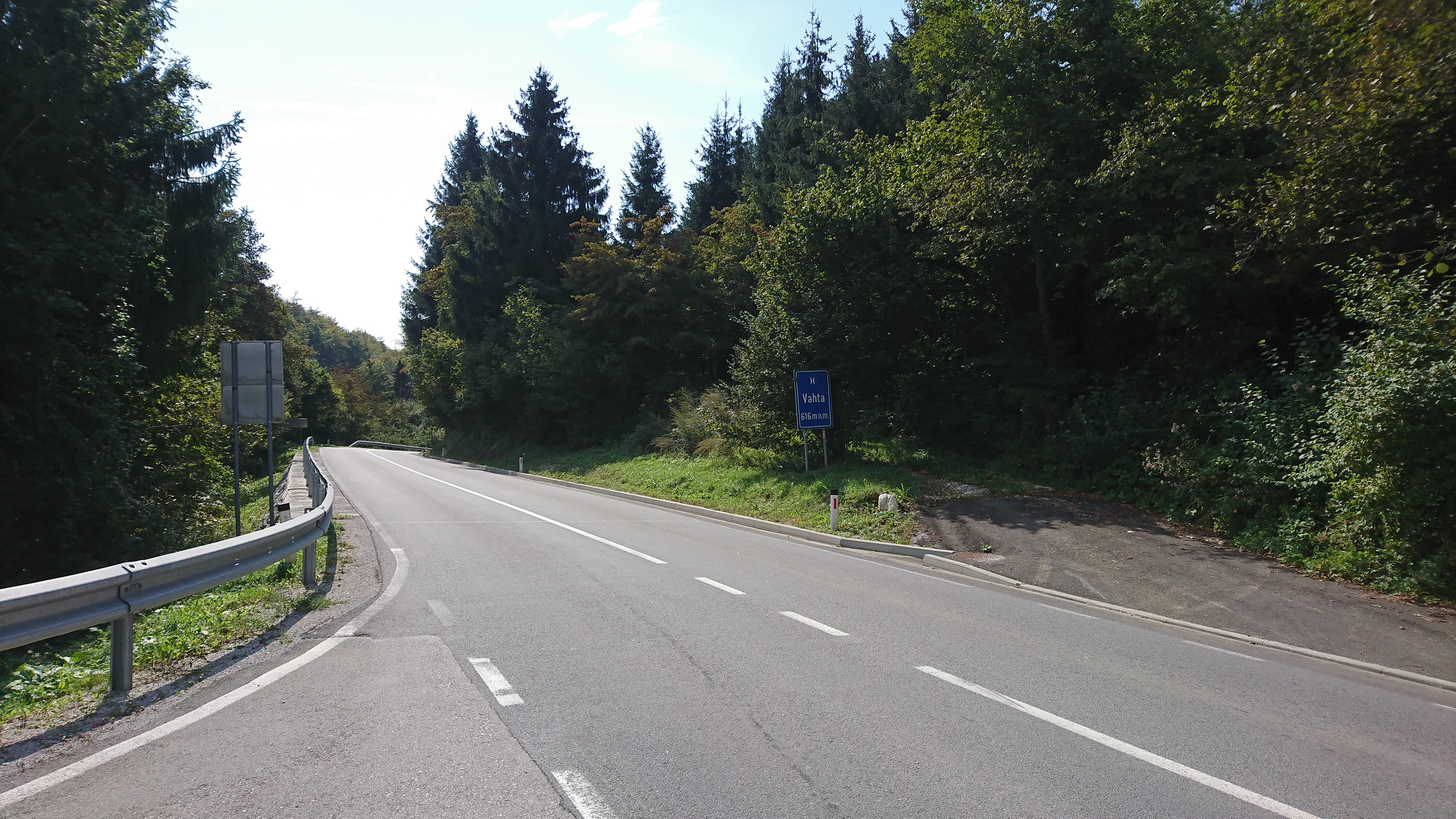 Cestni prelaz Vahta, smer Metlika.